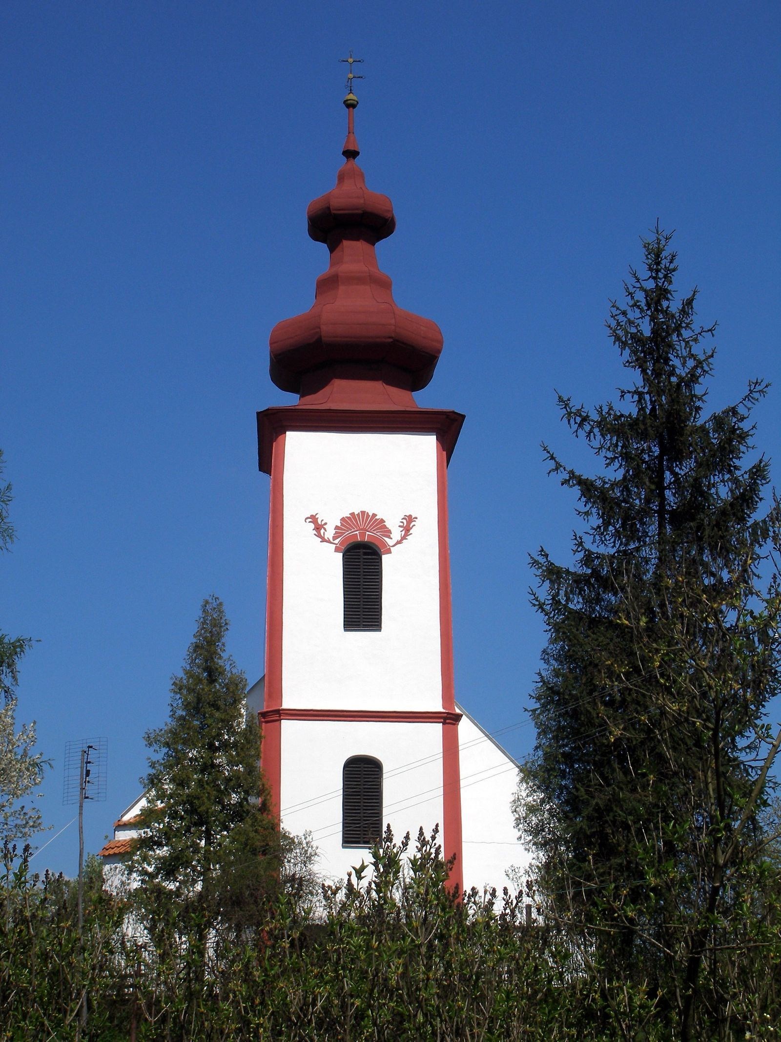 Obec Radatice a okolie. Okres Prešov, región Šariš.